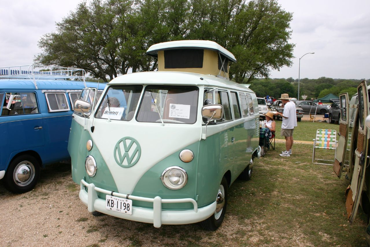 VW camper